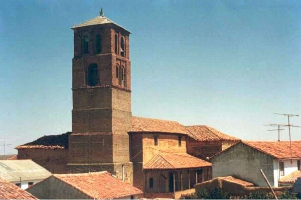 Iglesia de Santa María de Arbas Fotografía realizada por Josemanuel